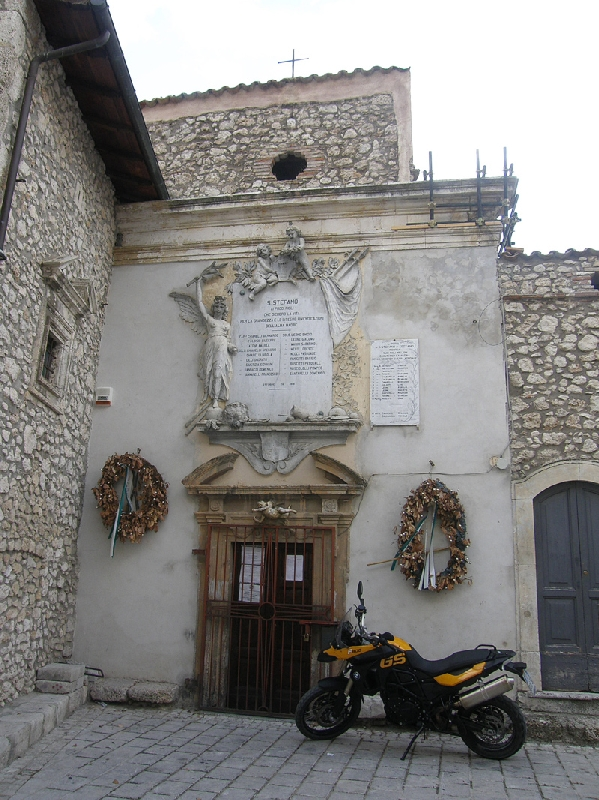 San Stefano di Sessanio